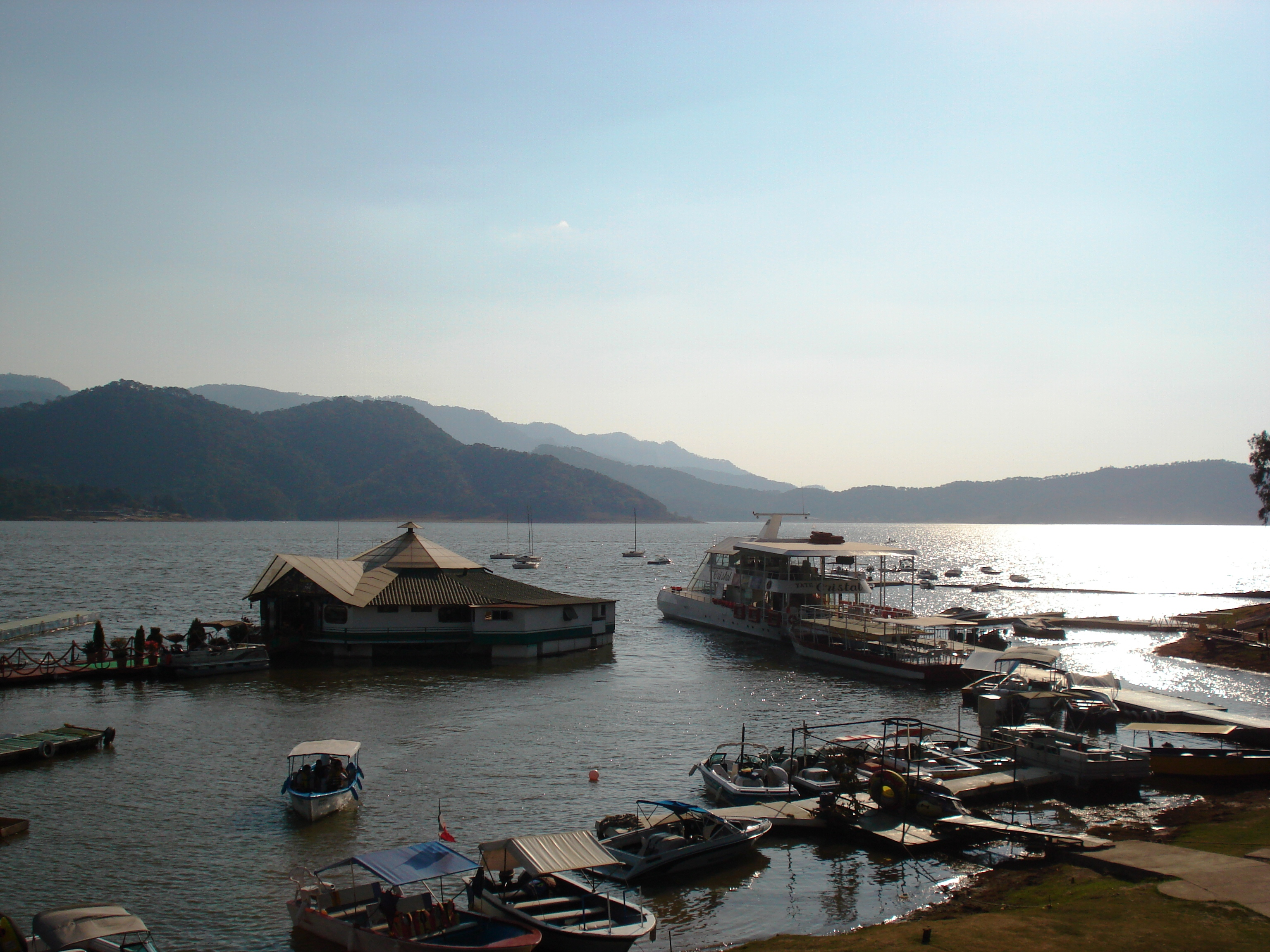 Presa de Valle de Bravo